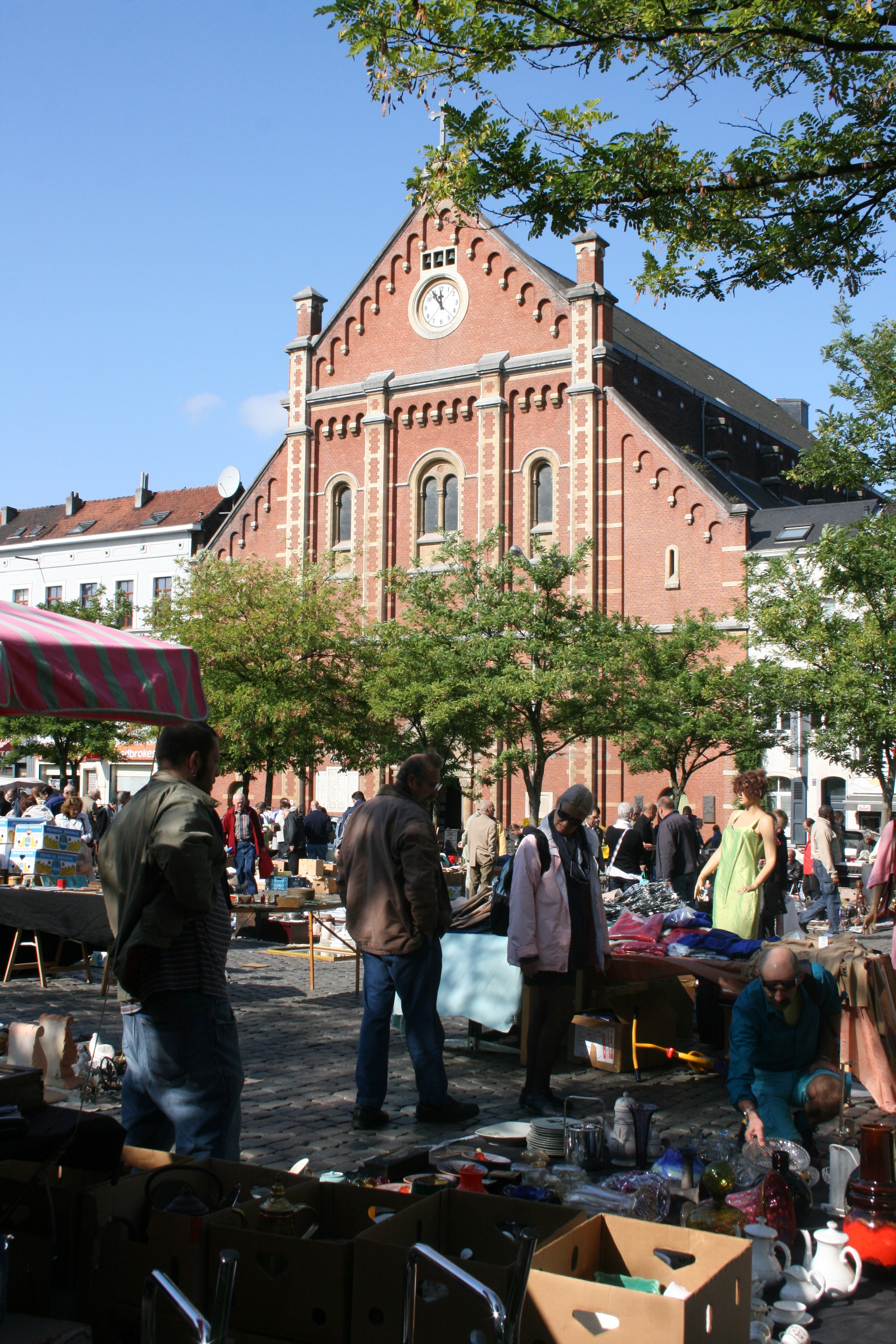 Marché aux puces sur la Place du Jeu de Balle, Bruxelles, Belgique. Eglise Notre-Dame-Immaculée à l'arrière-plan